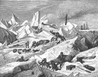 Payer a jégtáblákon